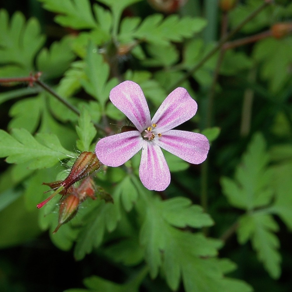 Geranium robertianum in Västerås